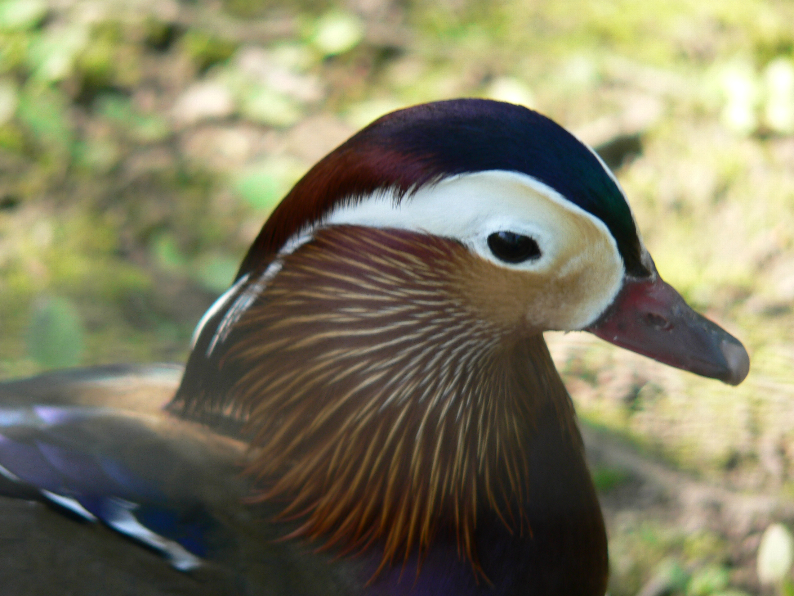 Aix galericulata